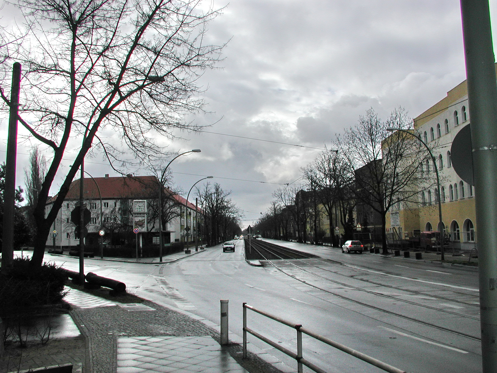 Treskowallee im mittleren Bereich (1)